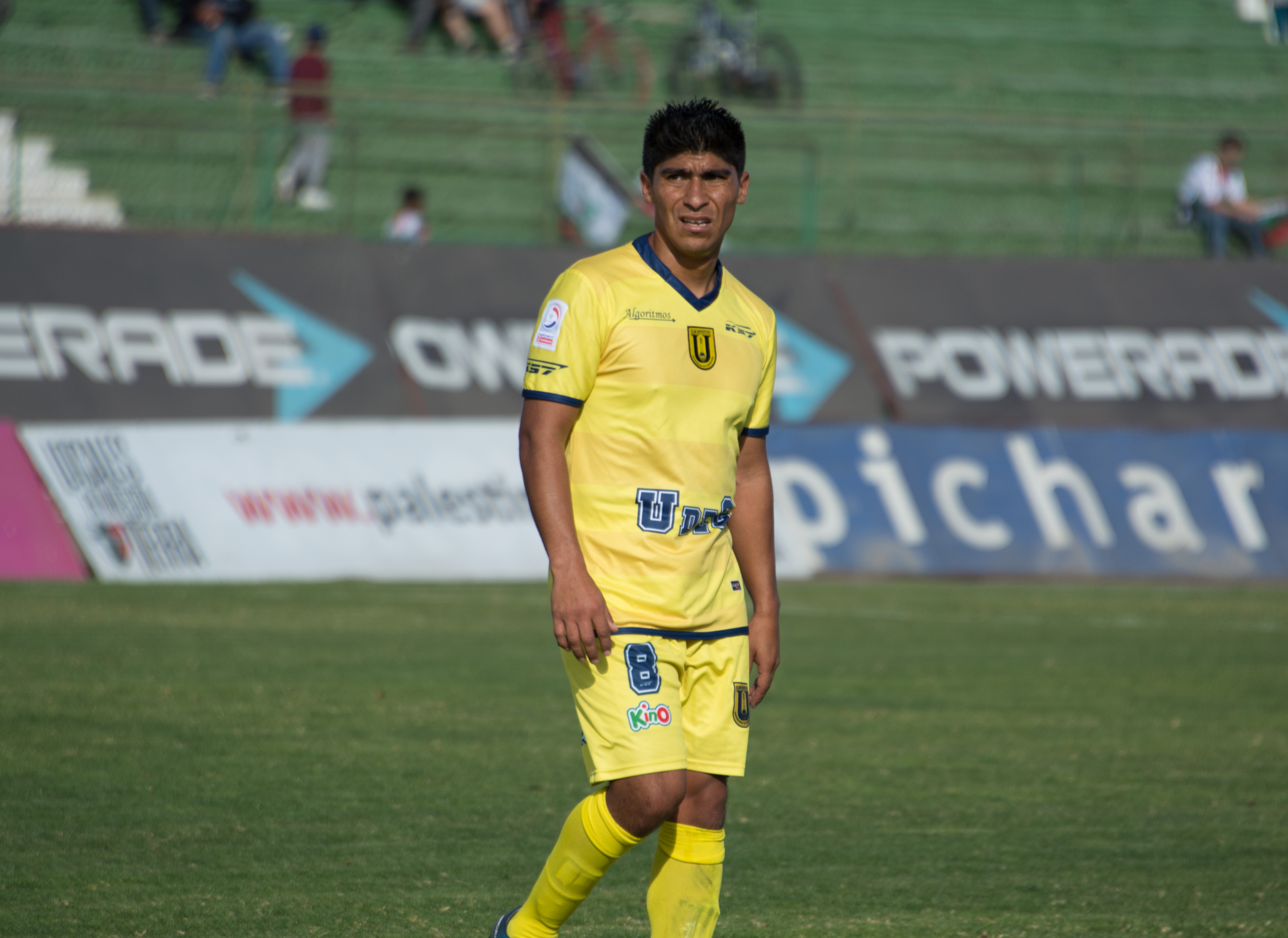 José Huentelaf, Palestino v Universidad de Concepción, Estadio Municipal de La Cisterna, La Cisterna, Santiago, Chile.